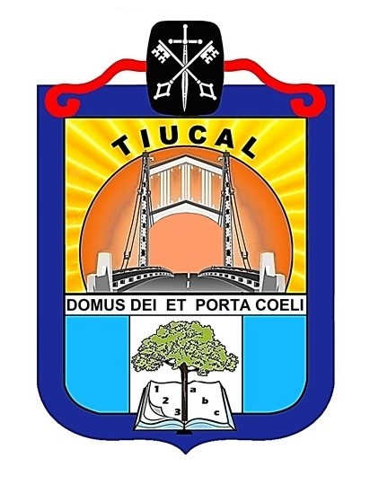 El Escudo Oficial de Aldea Tiucal Municipio de Asunción Mita, Departamento de Jutiapa, República de Guatemala. Fue Creado por el Profesor Jorge Luis Velásquez Villeda. Representa la Identidad Sociocultual de Tiucal.